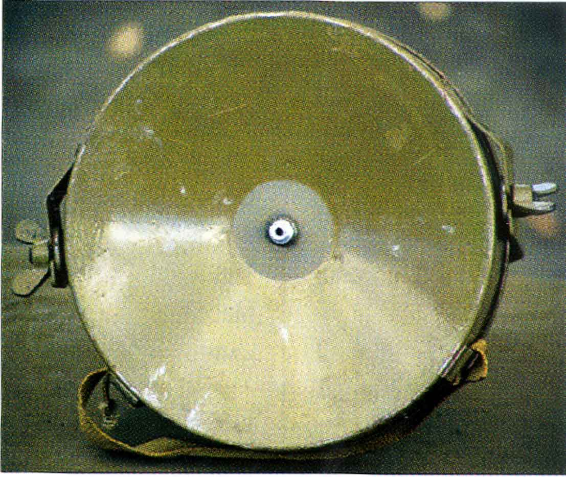 Sowiecka mina przeciwpiechotna MON-100